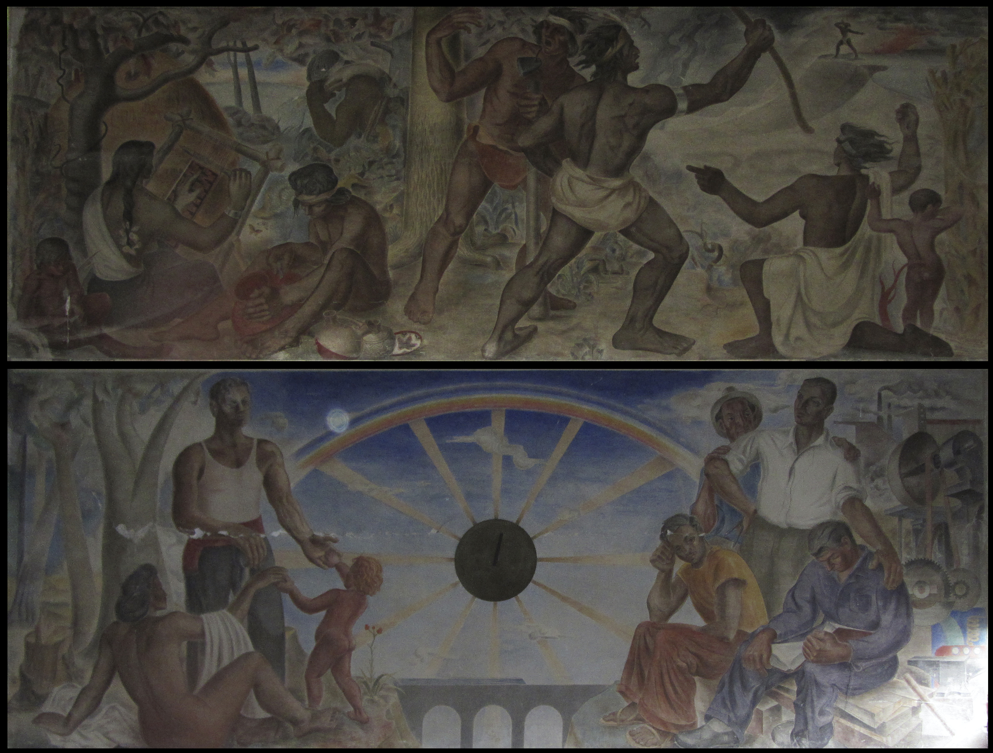 Mural "Hostoria de Concepción" (1943-1946) de Gregorio de la Fuente Barrio Cívico de Concepción, Chile Costados izquierdo (arriba) y derecho (abajo) Foto: Sepiembre de 2012. This is a photo of a national monument in Chile: 2150